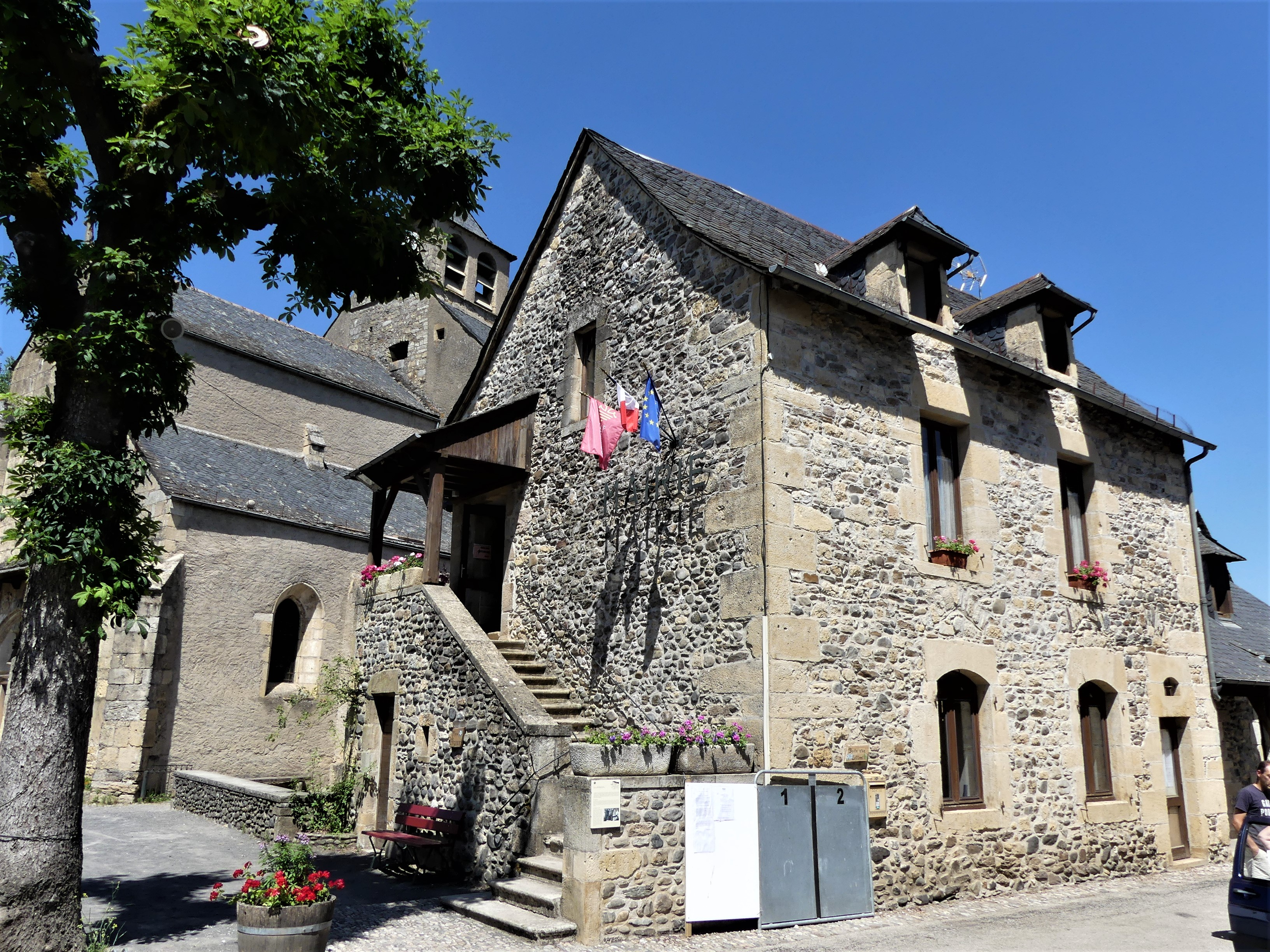 La mairie de Sainte-Eulalie-d'Olt, Aveyron, France.